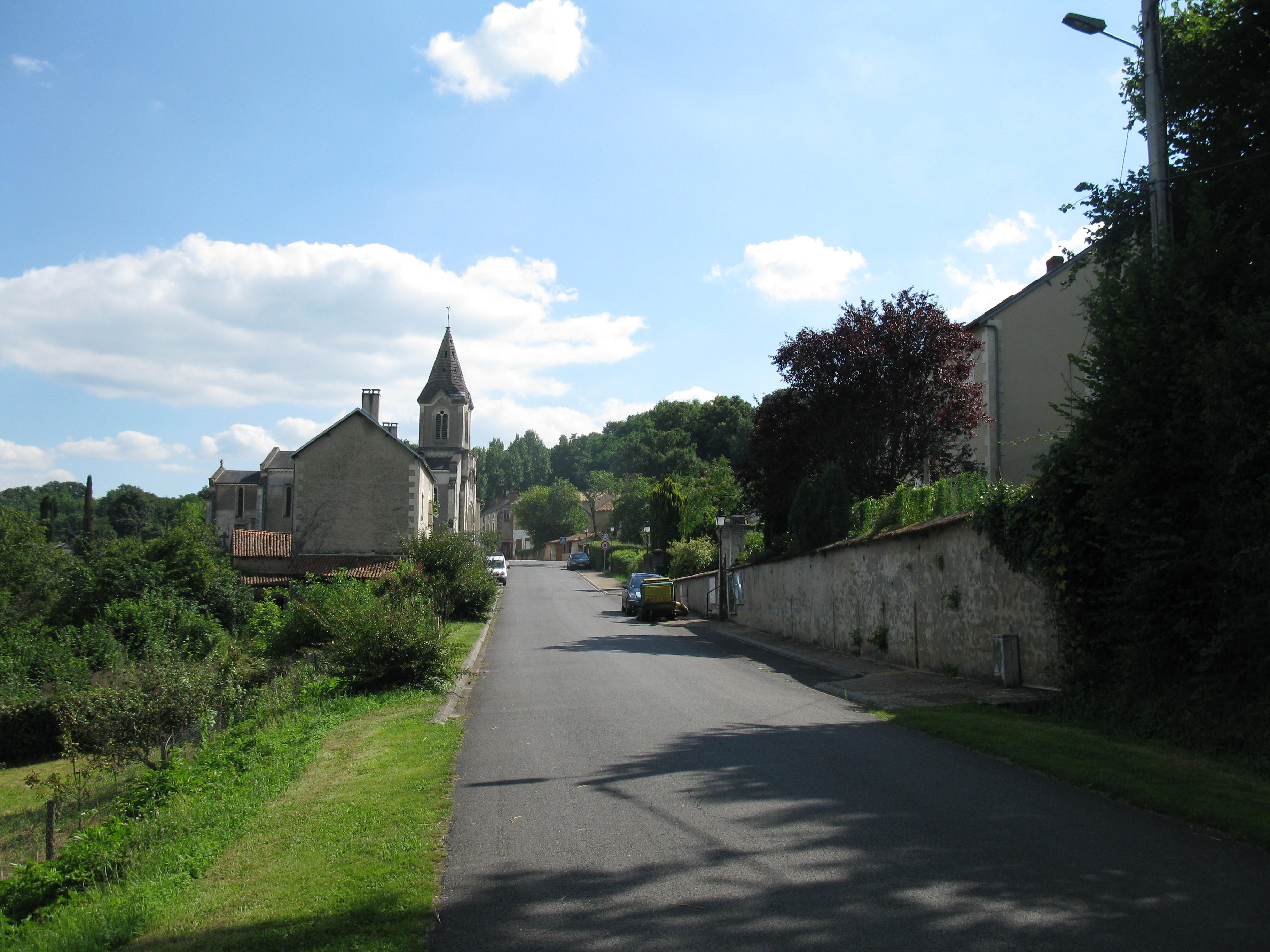 Entrée de la commune après le pont sur la Blourde